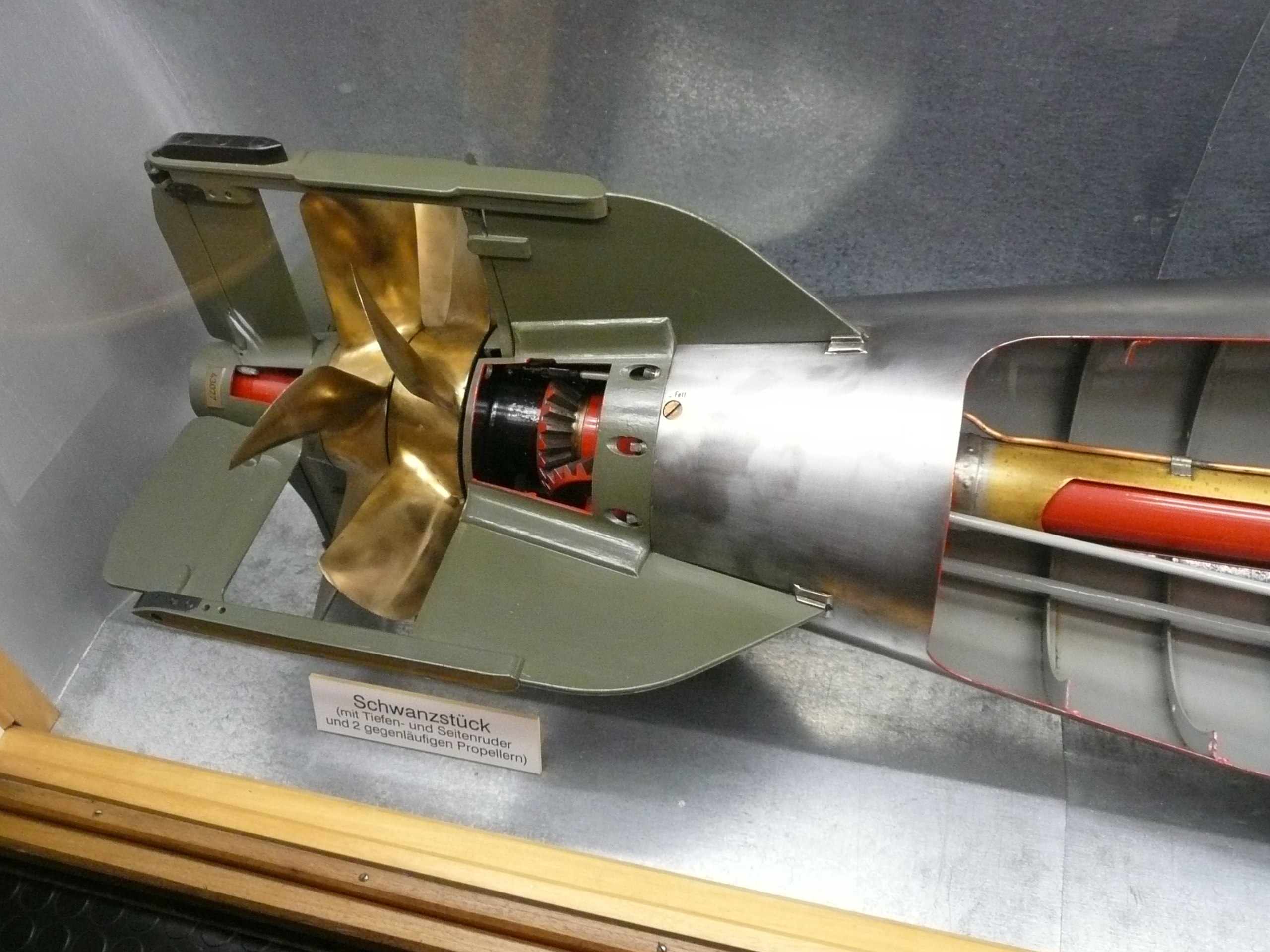 Antriebswelle und Propeller eines G7a Torpedos im Schnittmodell. Ausgestellt im Museumsunterseeboot Wilhelm Bauer in Bremerhaven.